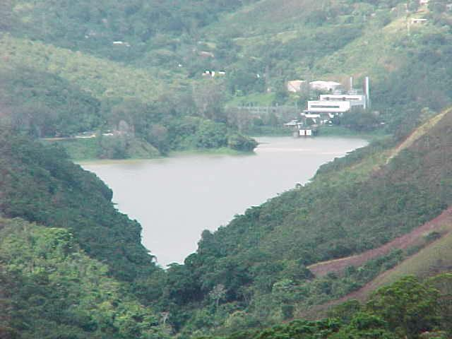 Embalse de La Mariposa Caracas - Venezuela en la cueneca del rio el Valle tibutario del Río Guaire